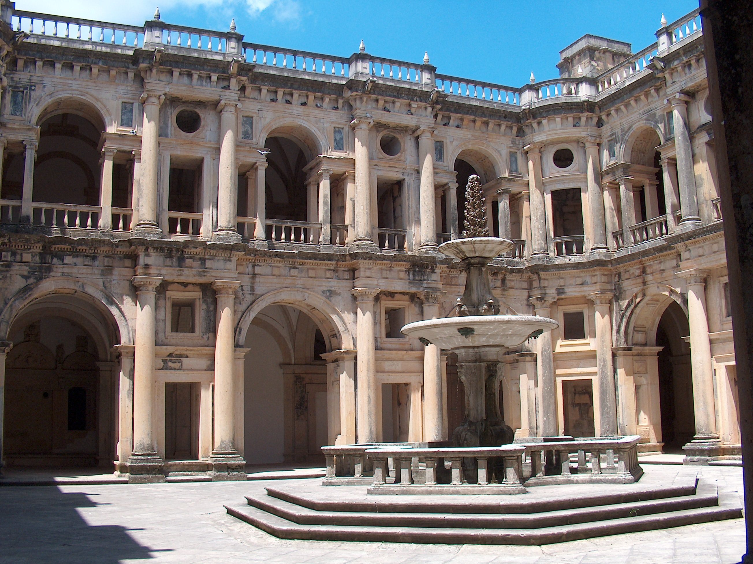 Convento de Cristo em Tomar